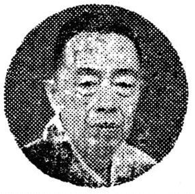 Kim Kyu-sik in 1948.04